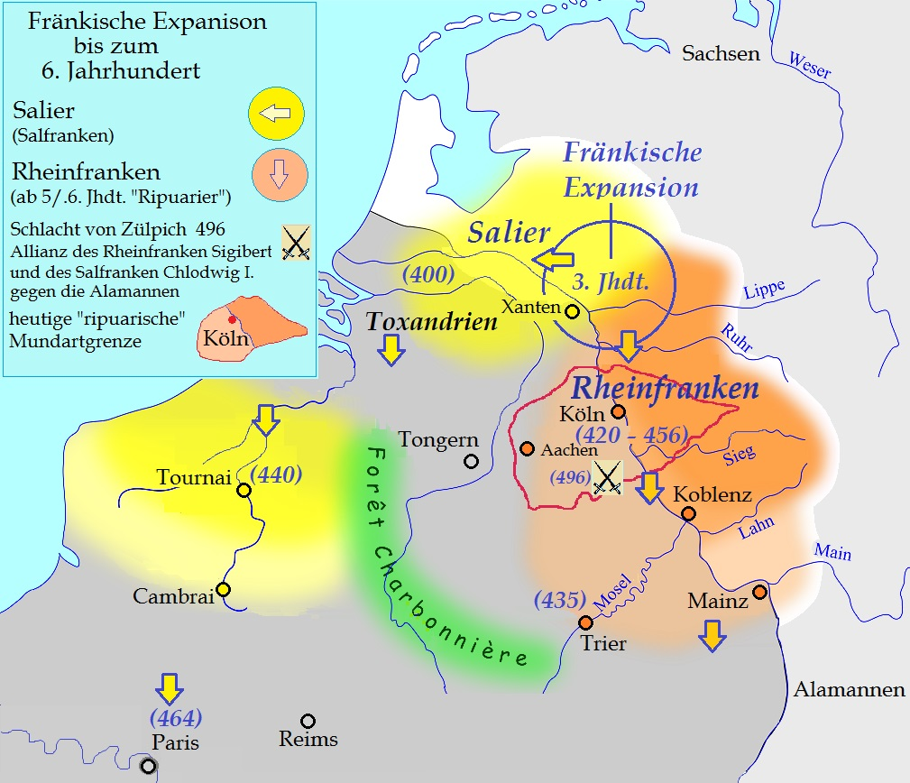 Salfranken-Expansion nach Toxandrien – Rheinfranken-Expansion zum Mittelrhein